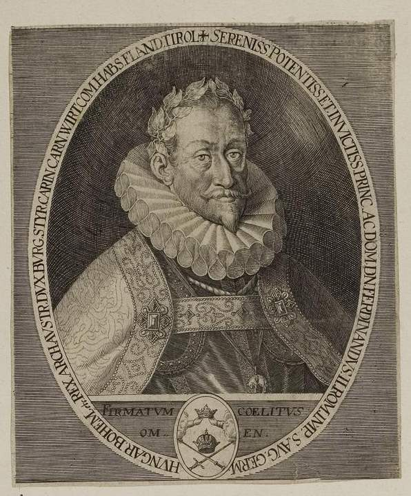 Grafik aus dem Klebeband Nr. 1 der Fürstlich Waldeckschen Hofbibliothek Arolsen Motiv: Kaiser Ferdinand II.